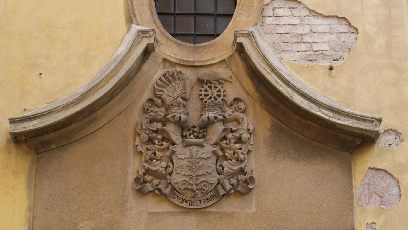 Erb Daubků nad vchodem kostela s heslem Suscipere finire (Omezit závazky)